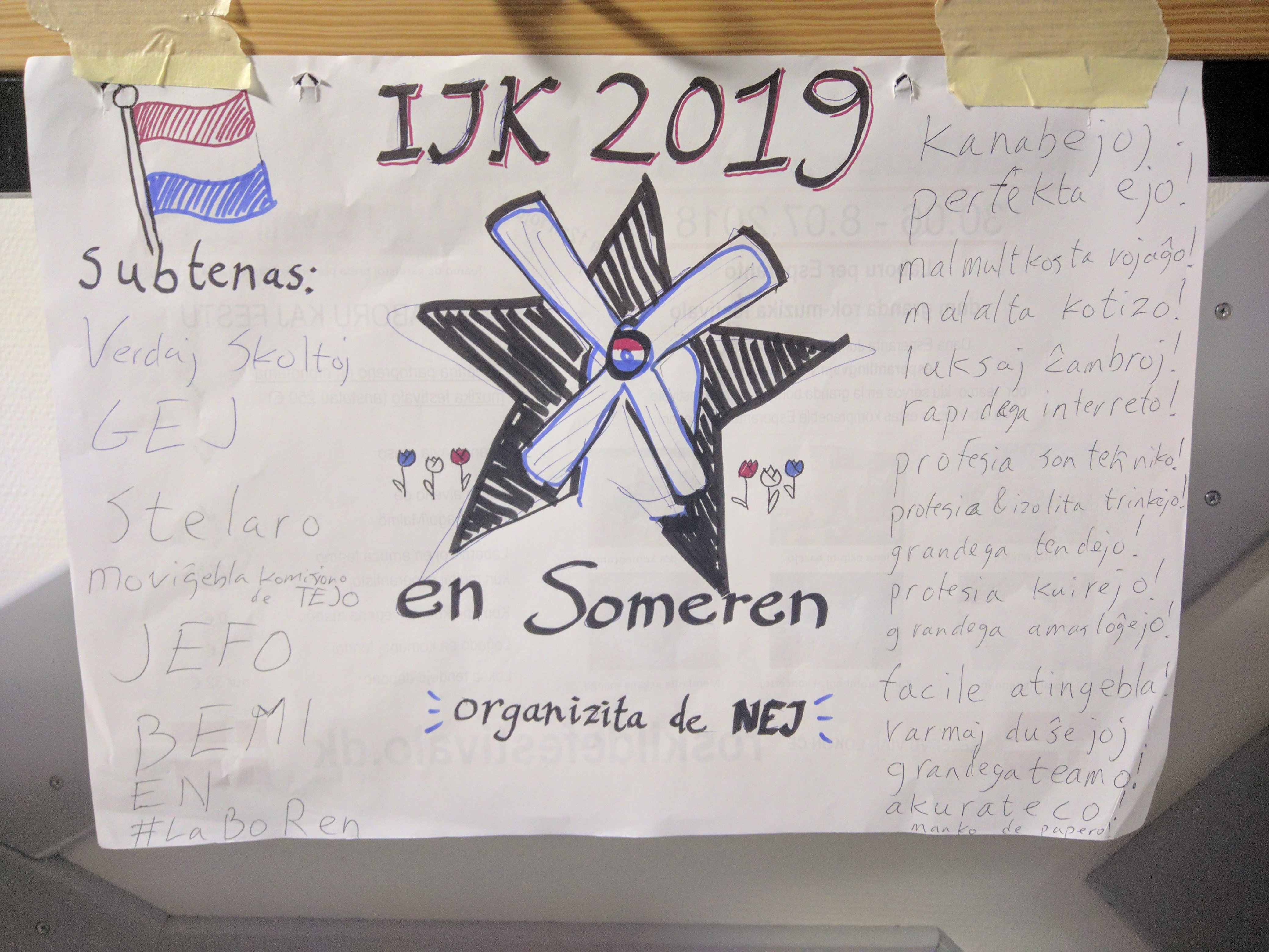 IJK en Nederlando